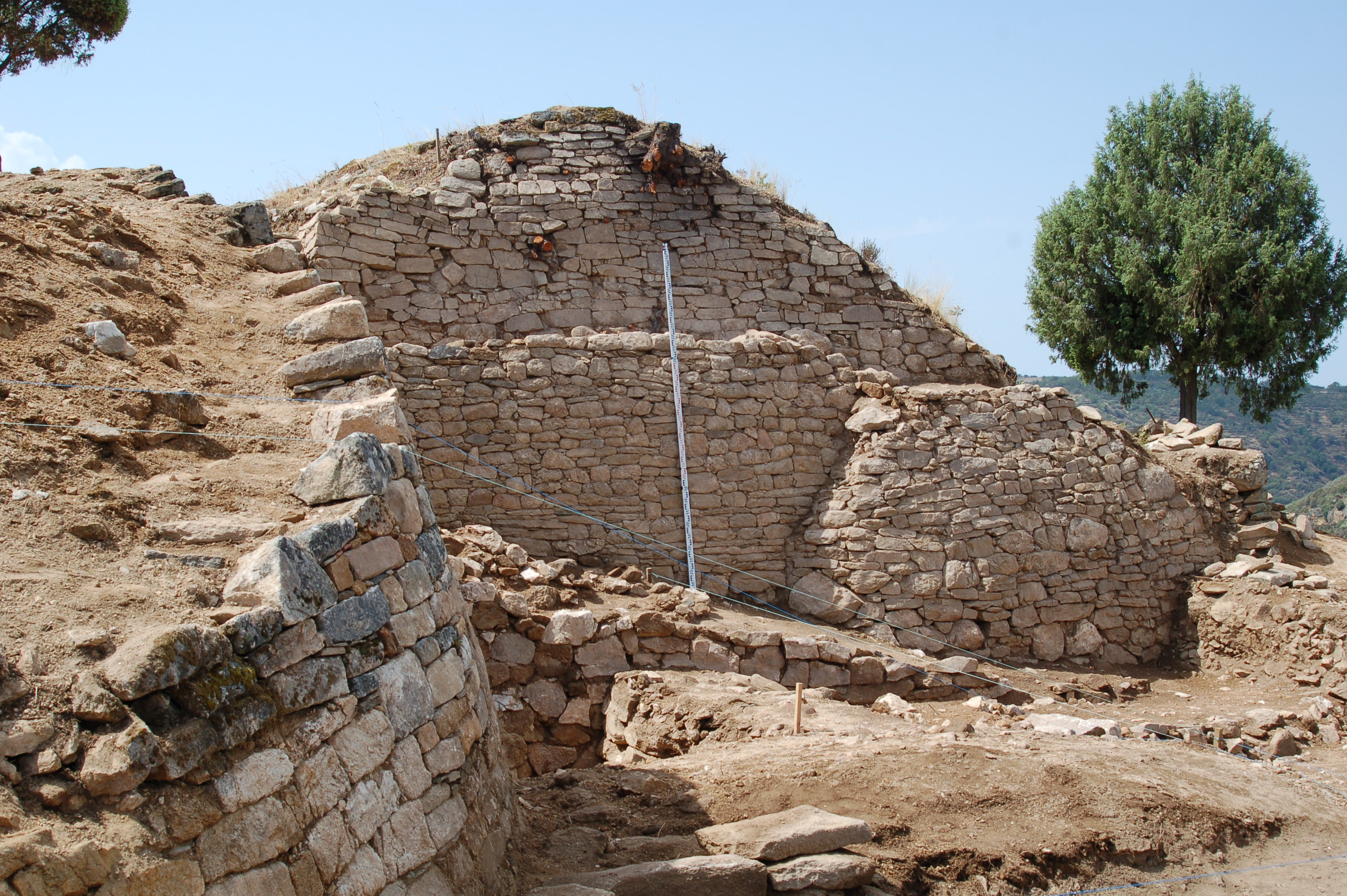 Muralha torreao torre contrafortes